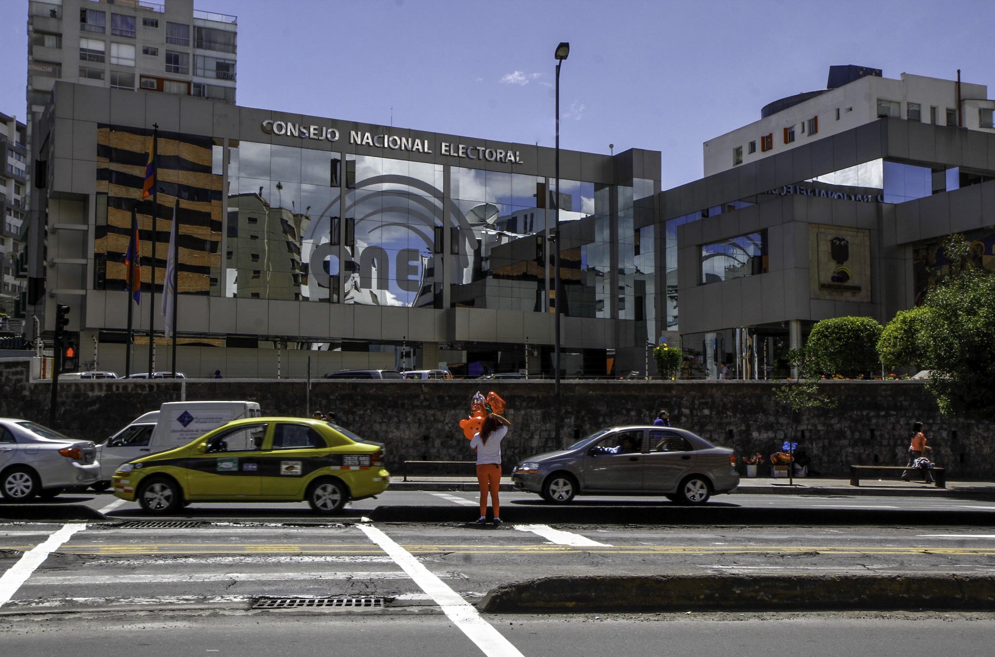 Quito, 13 feb (ANDES).- Esta mañana en las instalaciones del CNE sesionaron los miembros del consejo. foto: Micaela Ayala V./ANDES